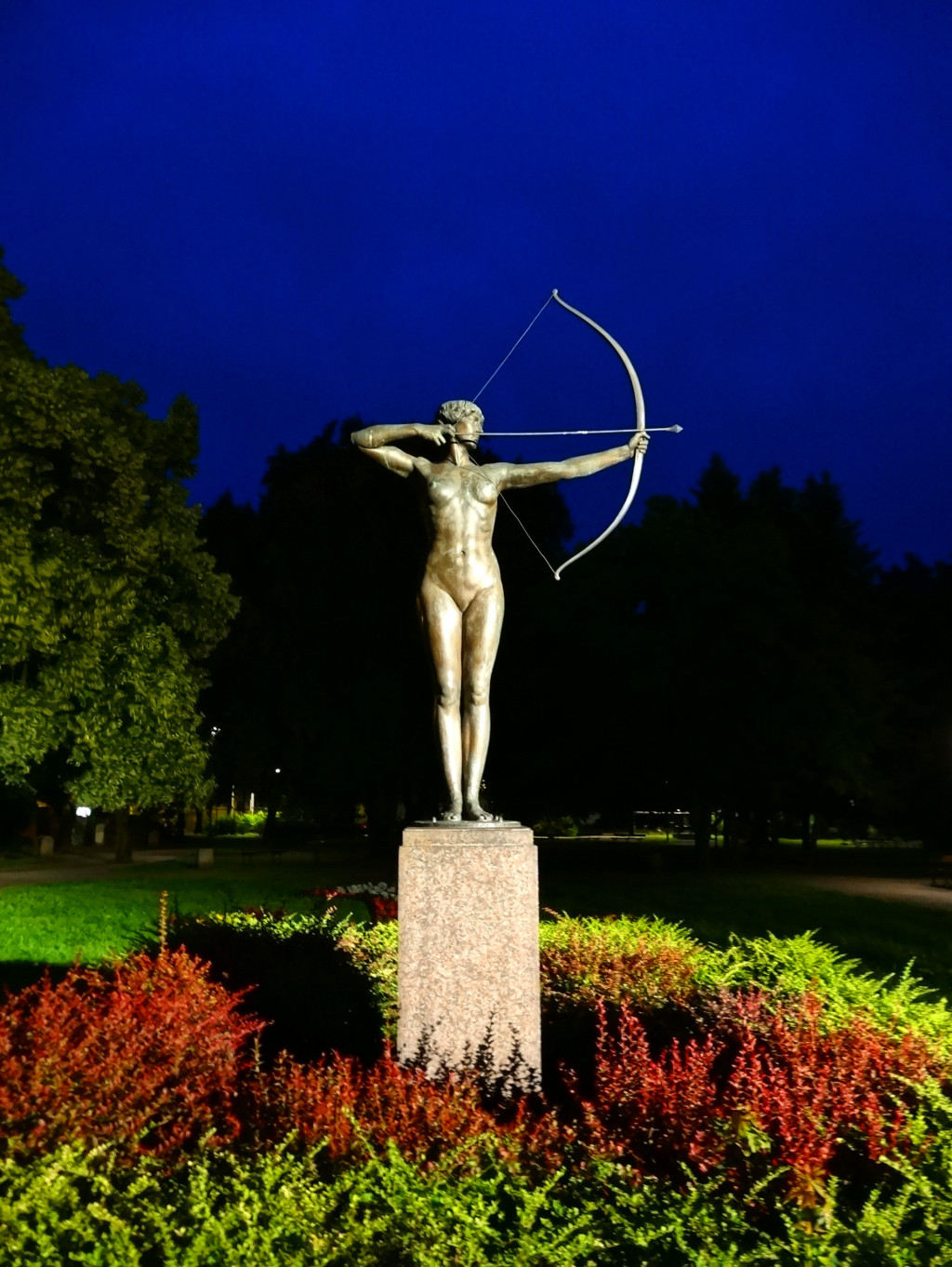 Rzeźba Łuczniczki autorstwa prof. Ferdinanda Lepcke odsłonięta w 1910 r. w Bydgoszczy